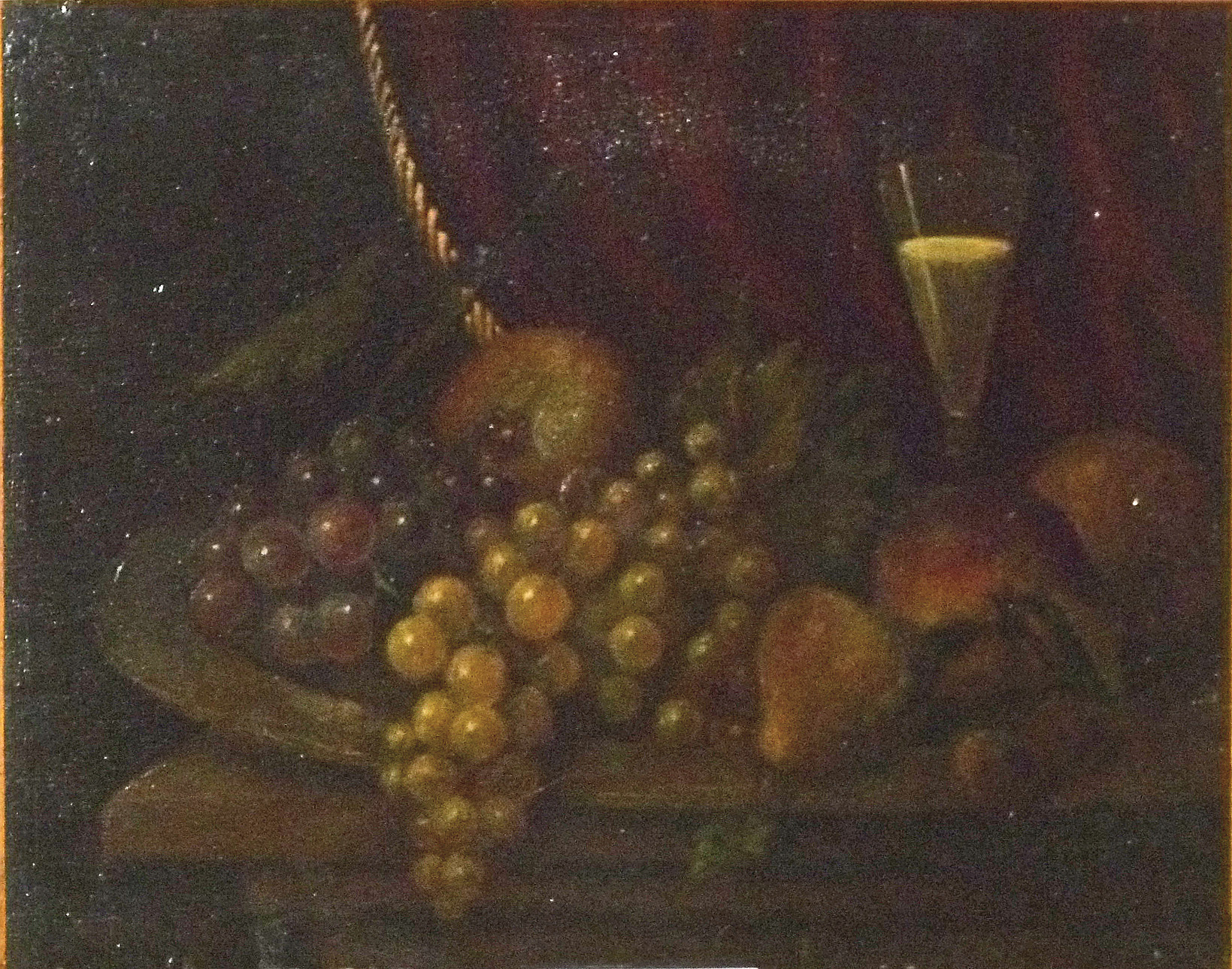 "Stilleven met fruit", olieverf op paneel (28 x 35 cm) door de Belgische kunstschilder Henri Robbe (1807-1899); privébezit